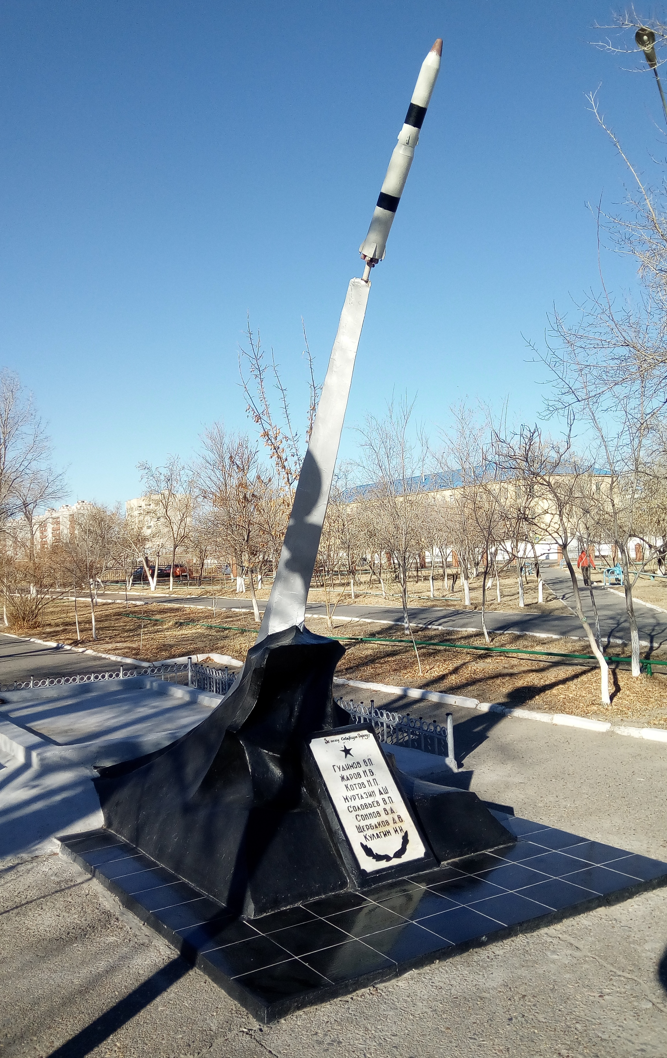 Памятник ракетчикам, погибших при взрыве ракеты Р-9А 24 октября 1963 года (Байконур)